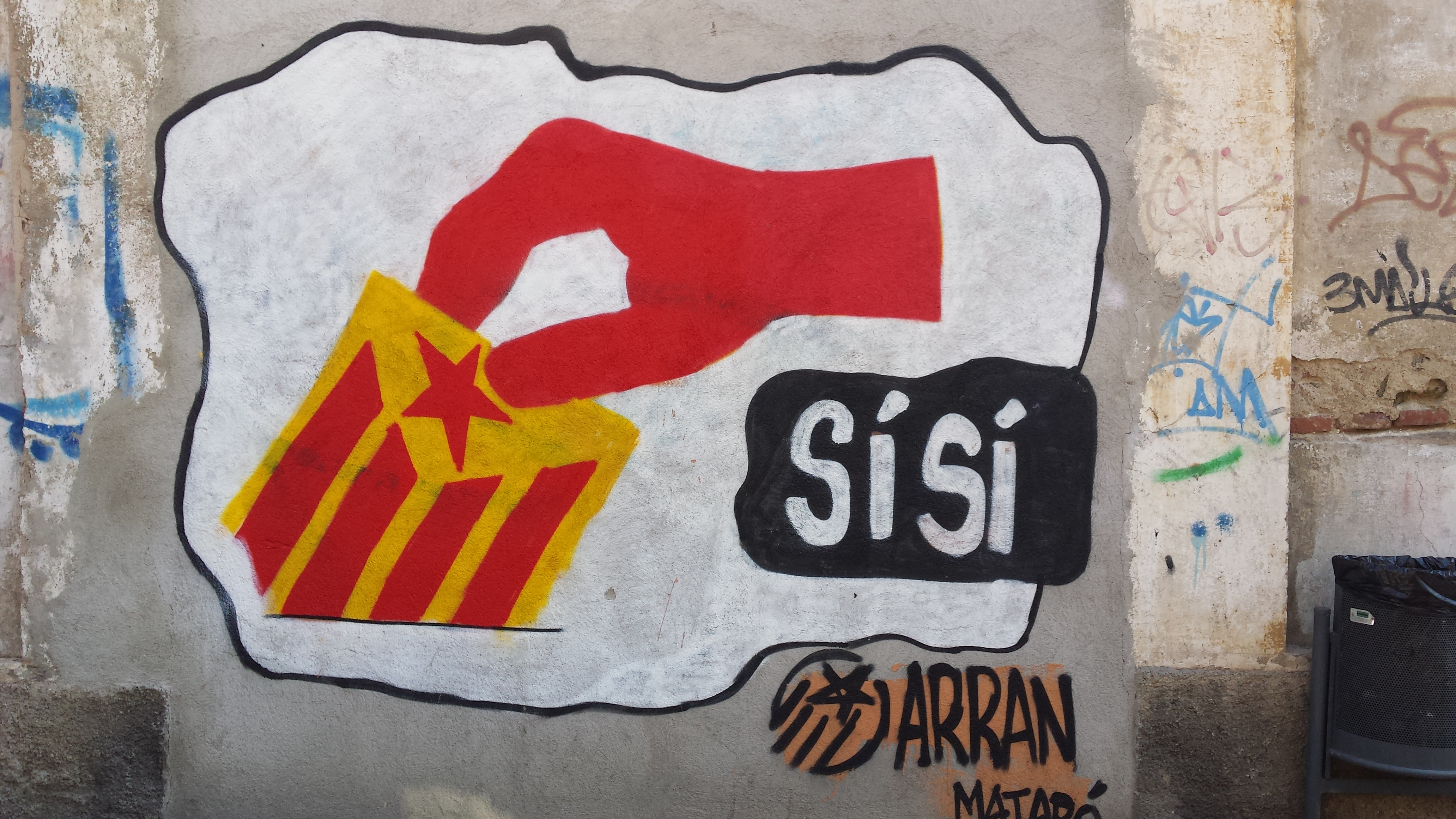 Grafit a favor del vot afirmatiu en la consulta sobre la independència de Catalunya realitzat a Mataró per part de l'organització Arran.